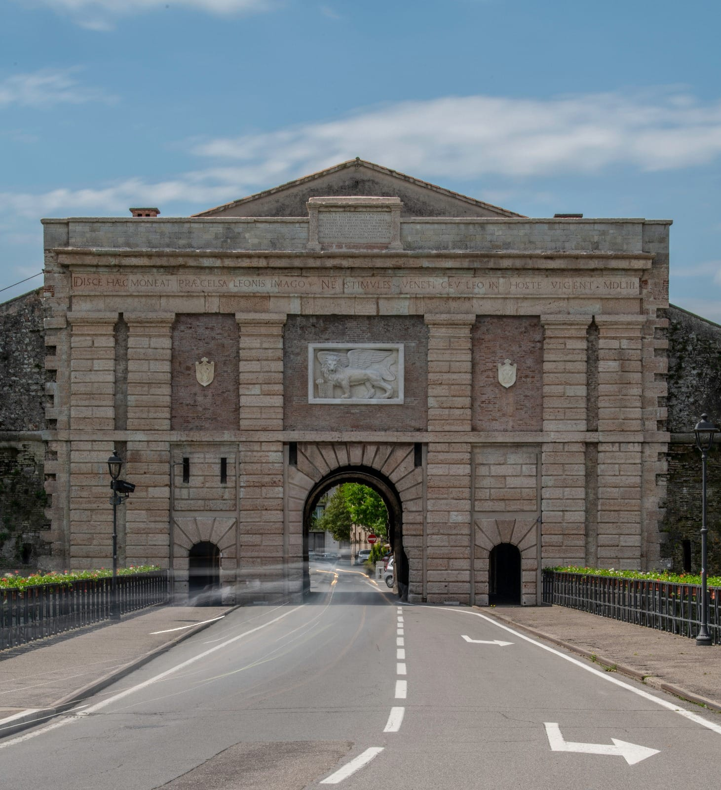 Porta Verona della Fortezza di Peschiera del Garda, riqualificata nel 2019. Sito UNESCO.